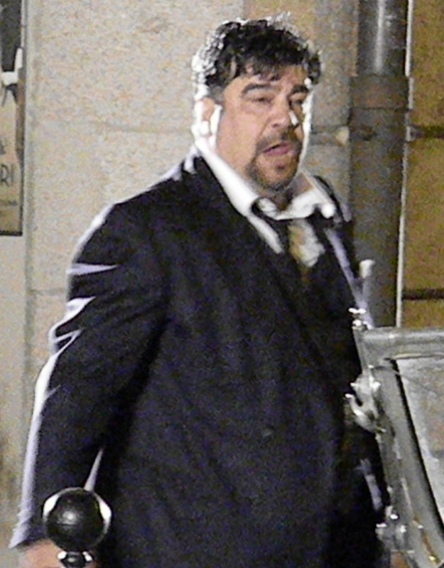 l'attore Francesco Pannofino nei panni di Augusto Vanghetta nel film Il pretore diretto da Giulio Base.